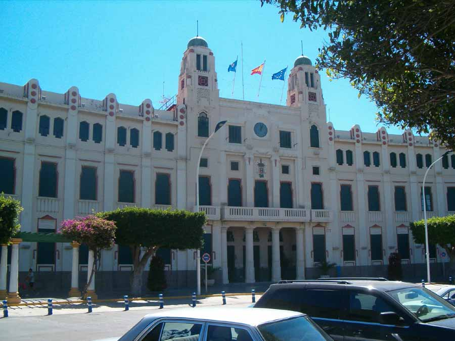 Asamblea de Melilla, en España